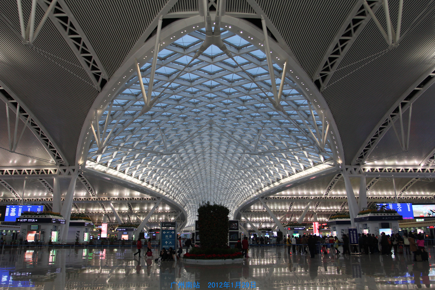 广州南站 guang zhou nan zhan